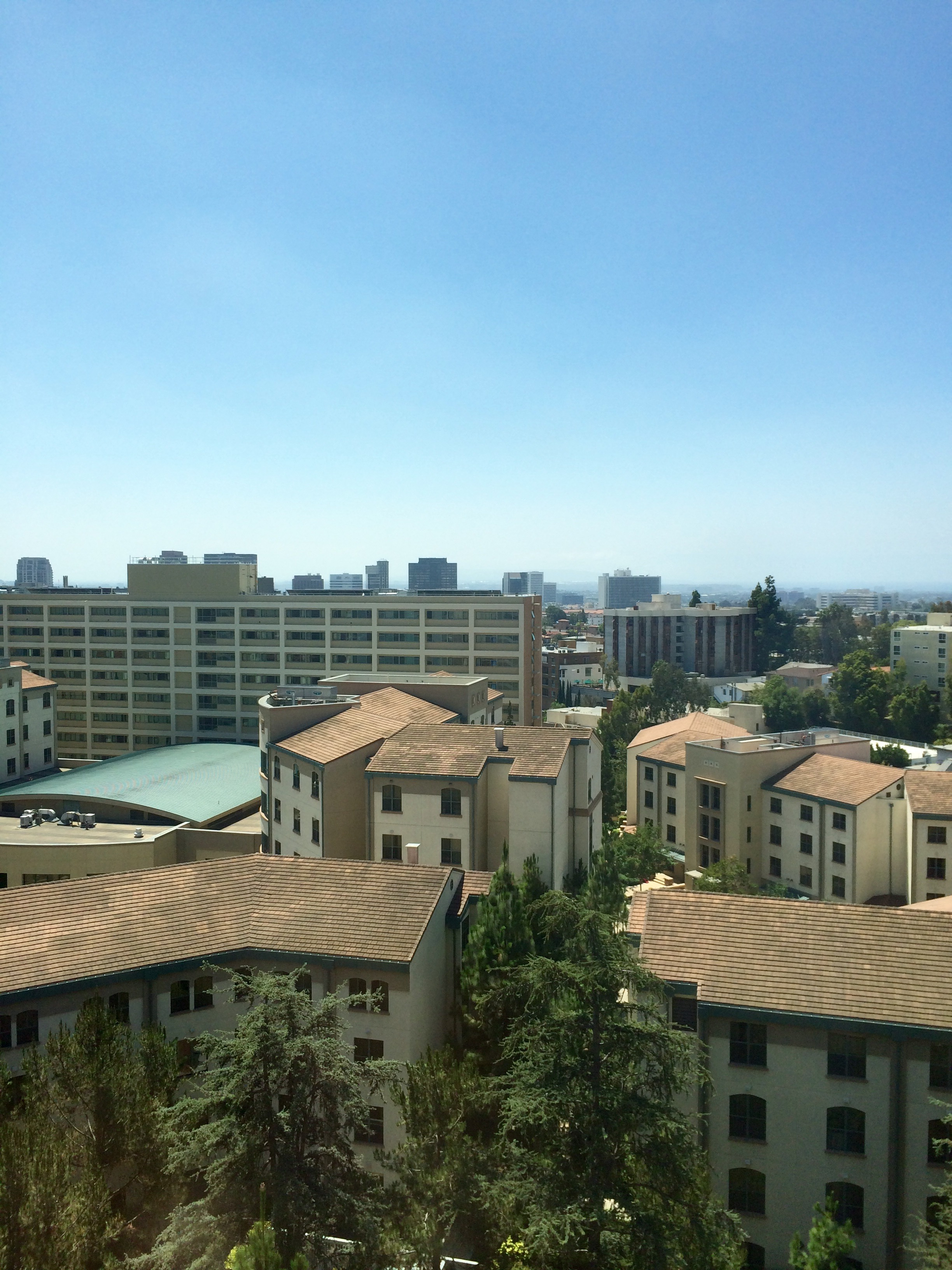 中文（中国大陆）: UCLA dorm